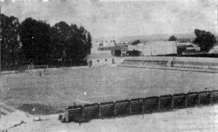 Estadio de fútbol del Velódromo, hacia 1895.